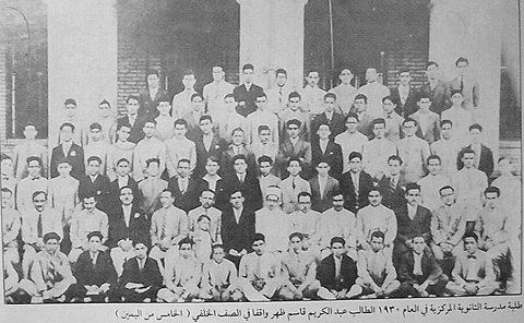 طلبة الثانوية المركزية وبينهم عبد الكريم قاسم